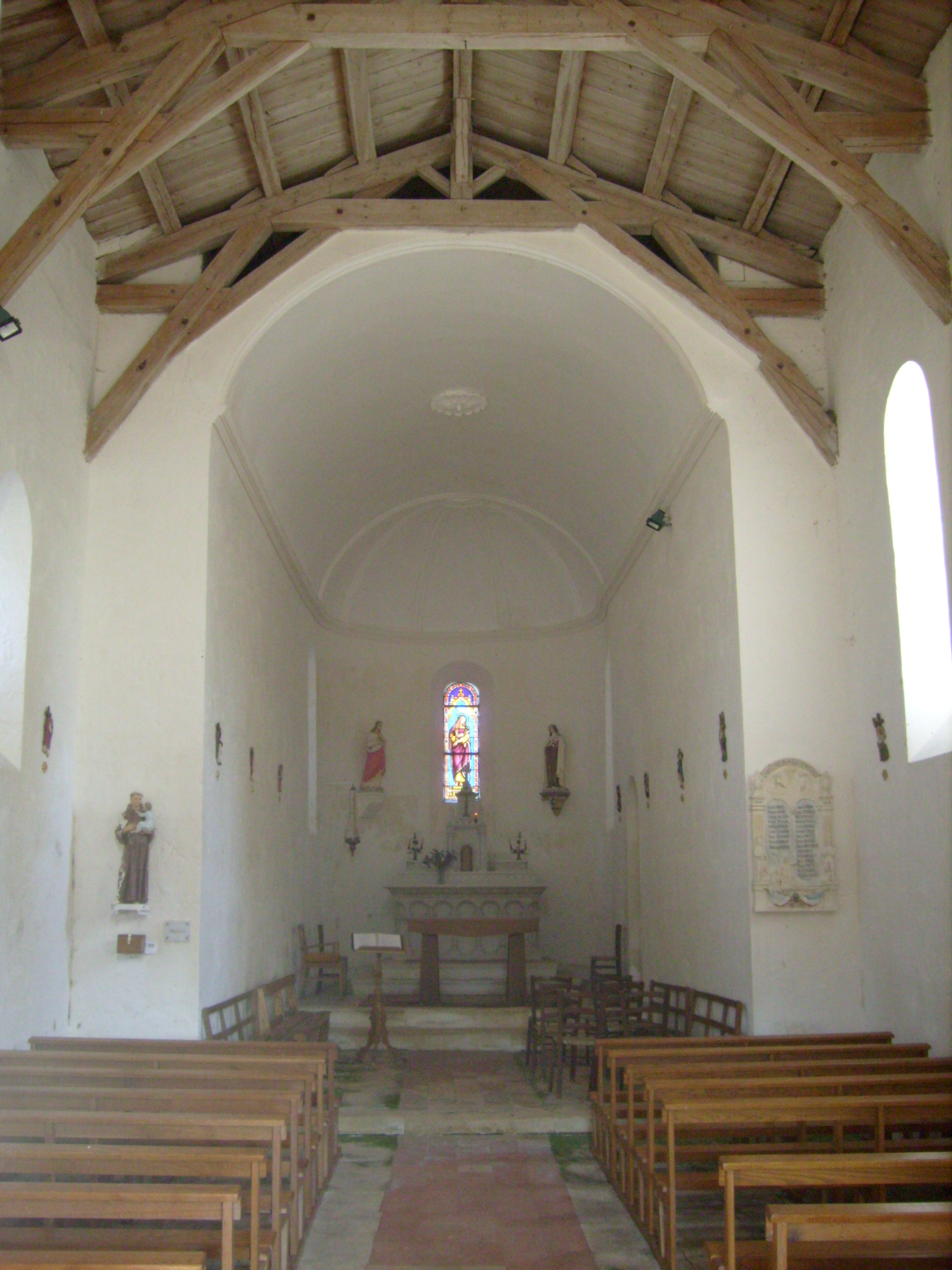 Intérieur de l'église de Balanzac